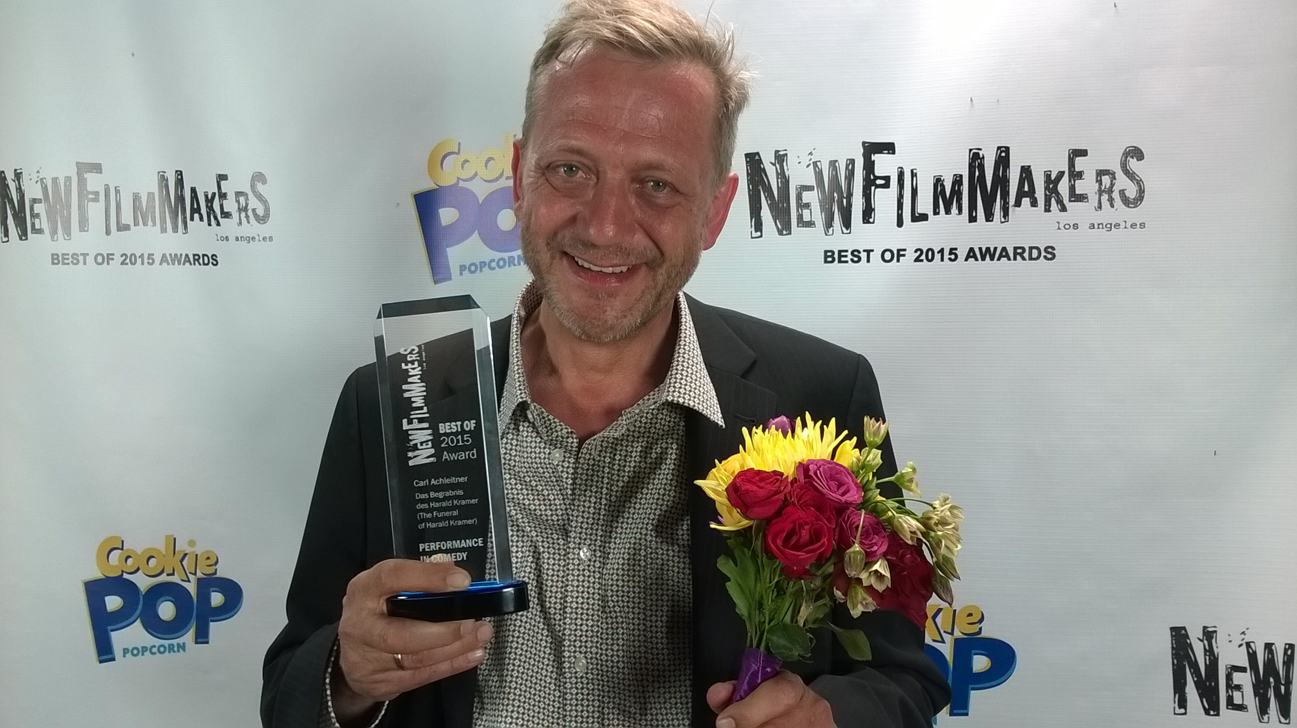 Best Performance Comey - New Filmmakers Los Angeles